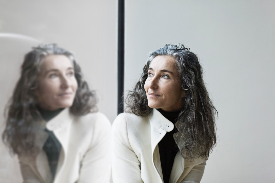 Portrait Vera Purtscher by Darko Todorovic